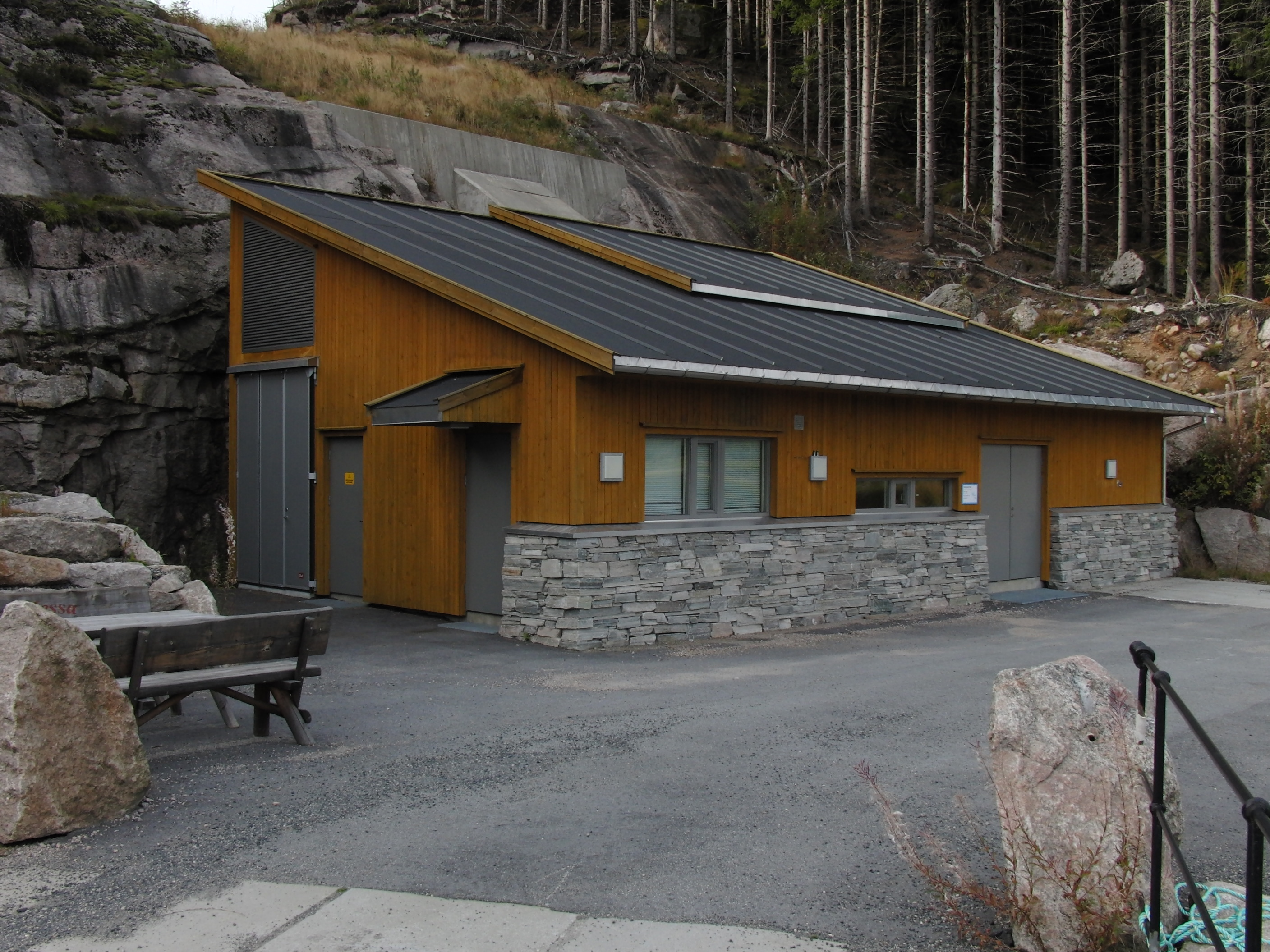 Færåsen kraftverk